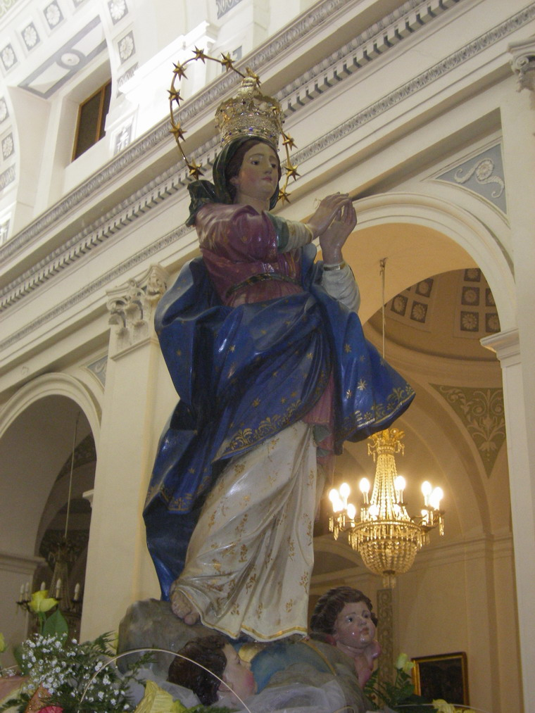 San Michele di Ganzaria: Festa della Immacolata Concezione della Beata Vergine Maria, processione, la statua dell'Immacolata.